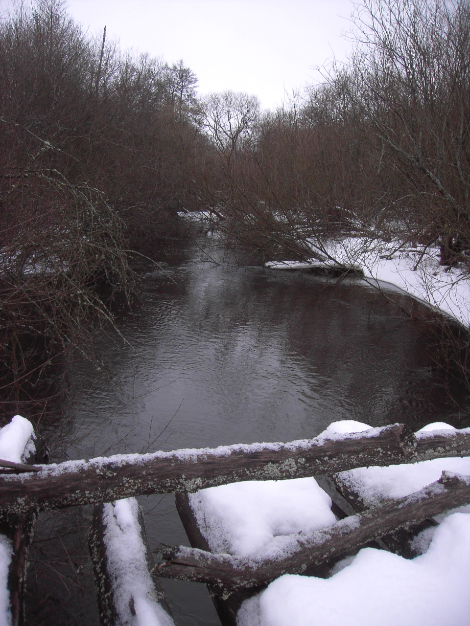 Merkys nuo tilto į Pamerkių viensėdį